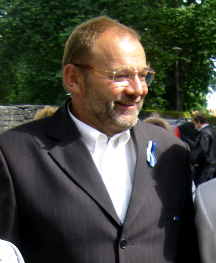 Kalju Koha